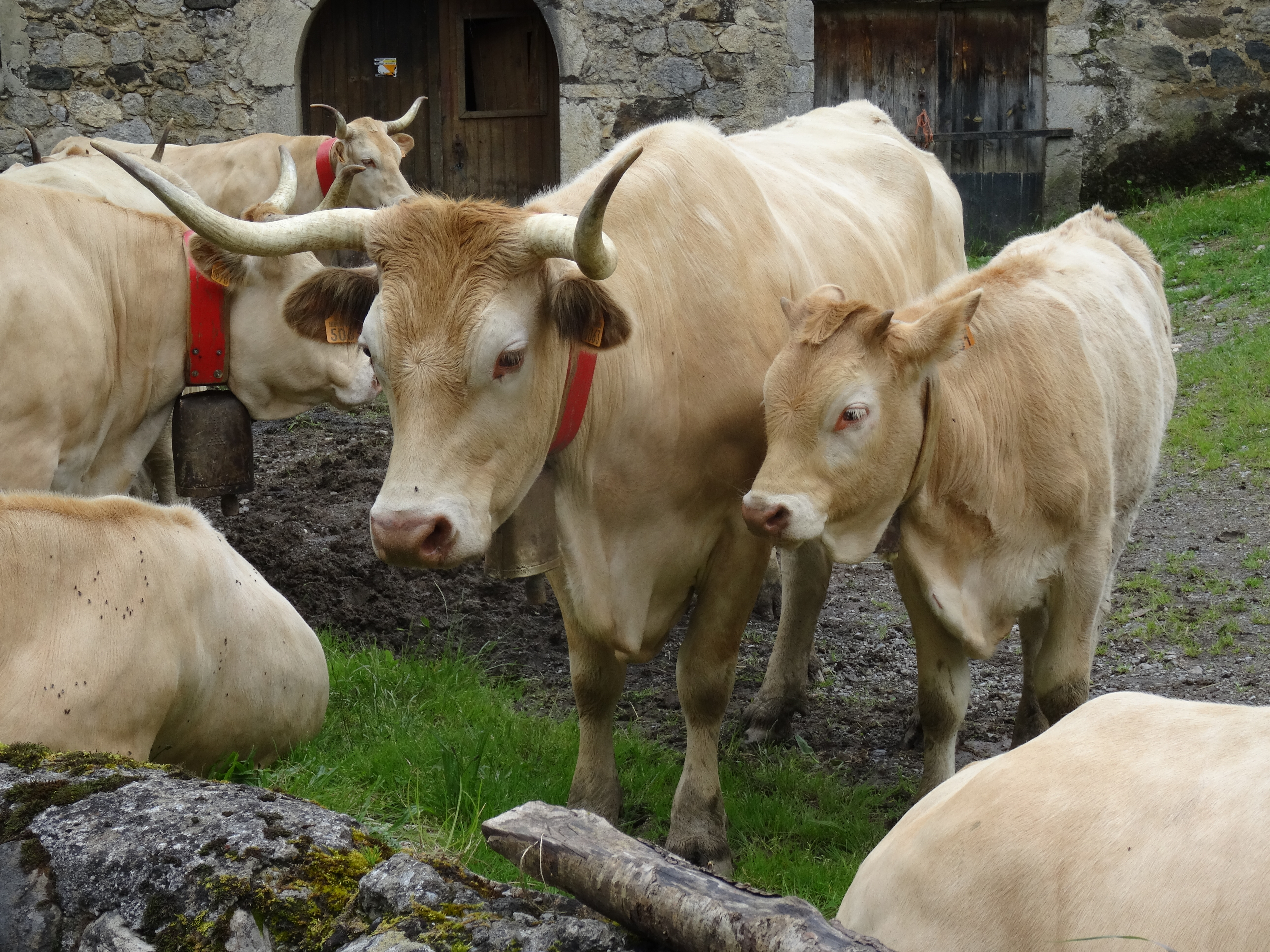 Une vache béarnaise et son veau à Lourdios-Ichère.